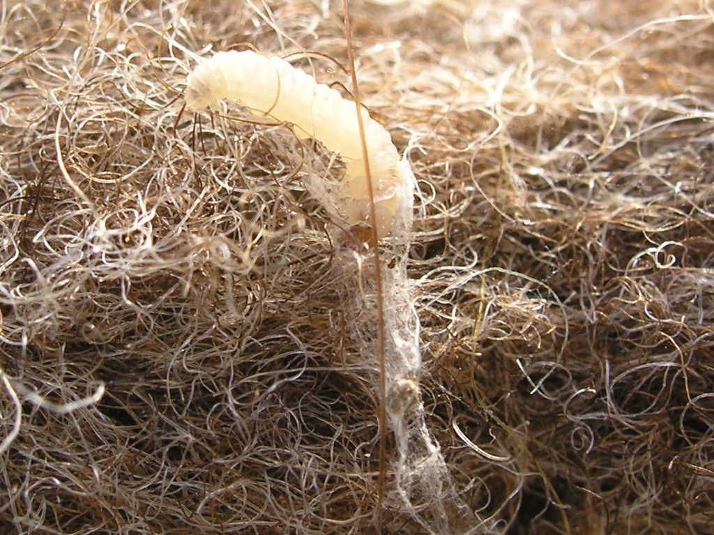 larva on felt, probably Tineola bisselliella